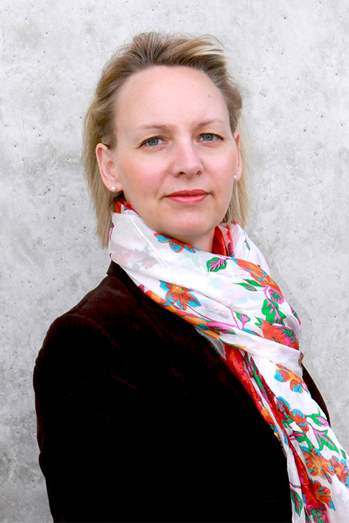 Porträtfoto von Frau Prof. Dr. Isabella von Treskow